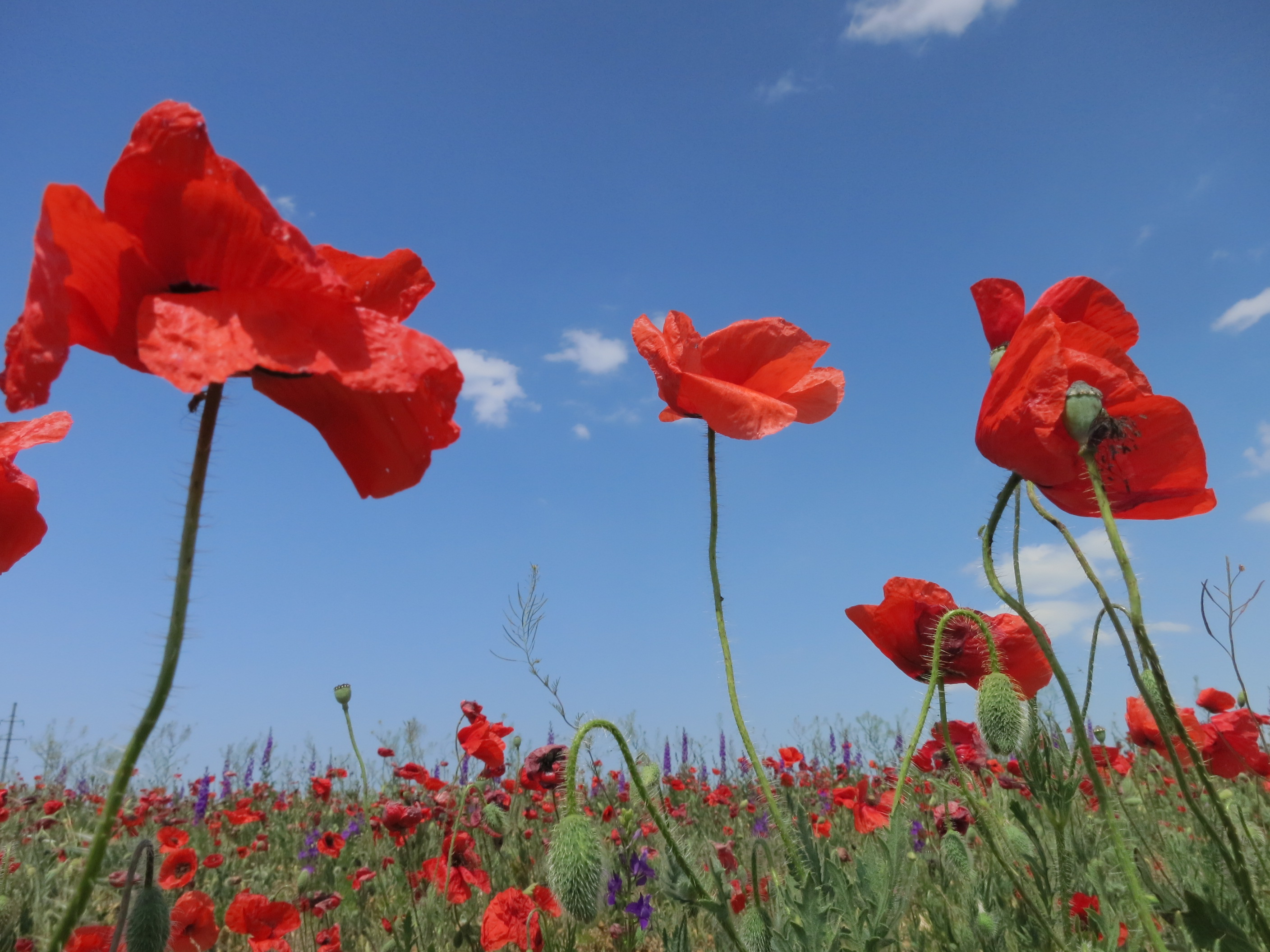 Донузлав, Чорноморський район, за межами населених пунктів Новоівановської і Красноярської сільських рад, Сакський район, за межами населених пунктів Веселовської сільської ради